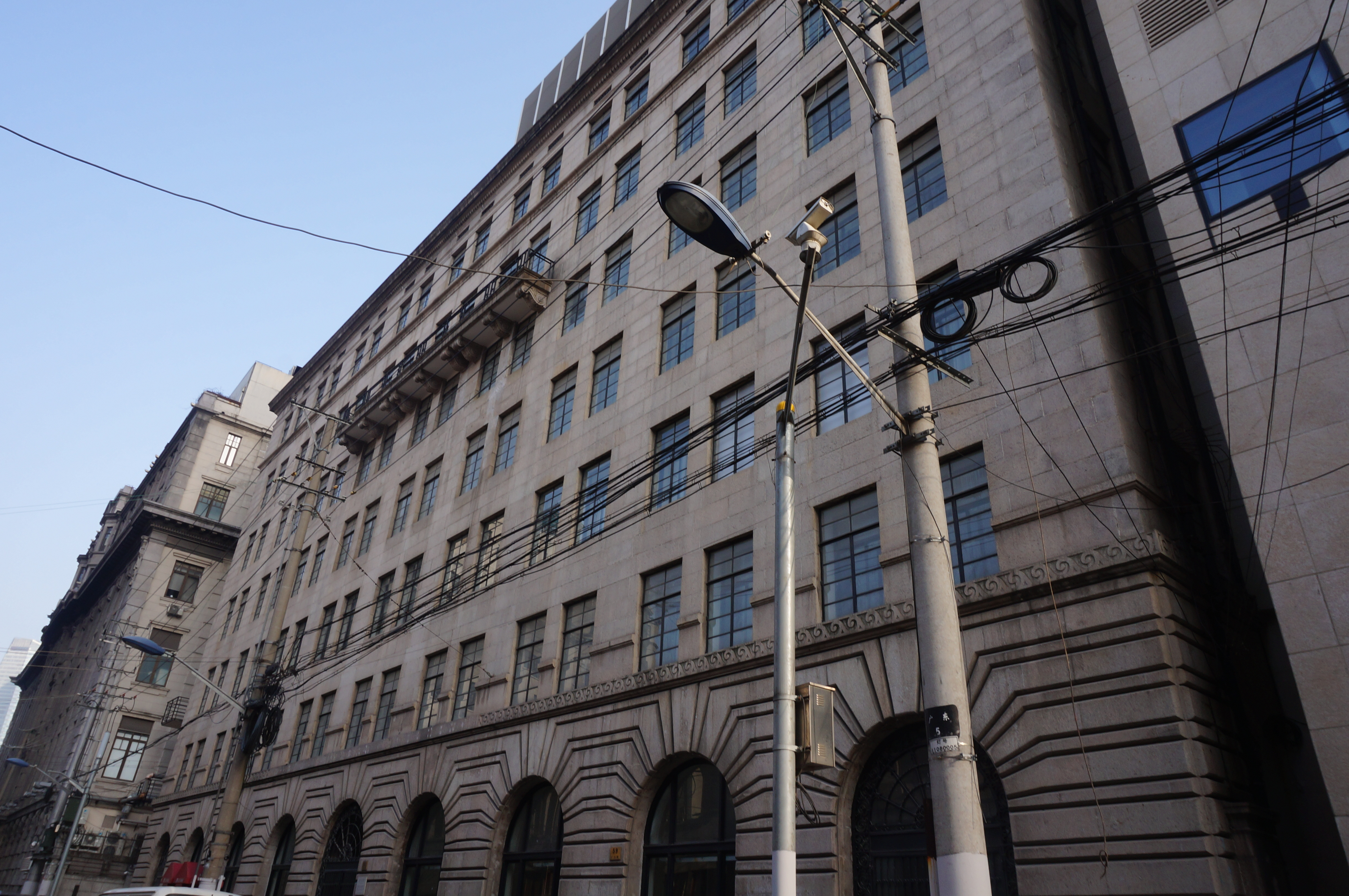 原上海大来大楼